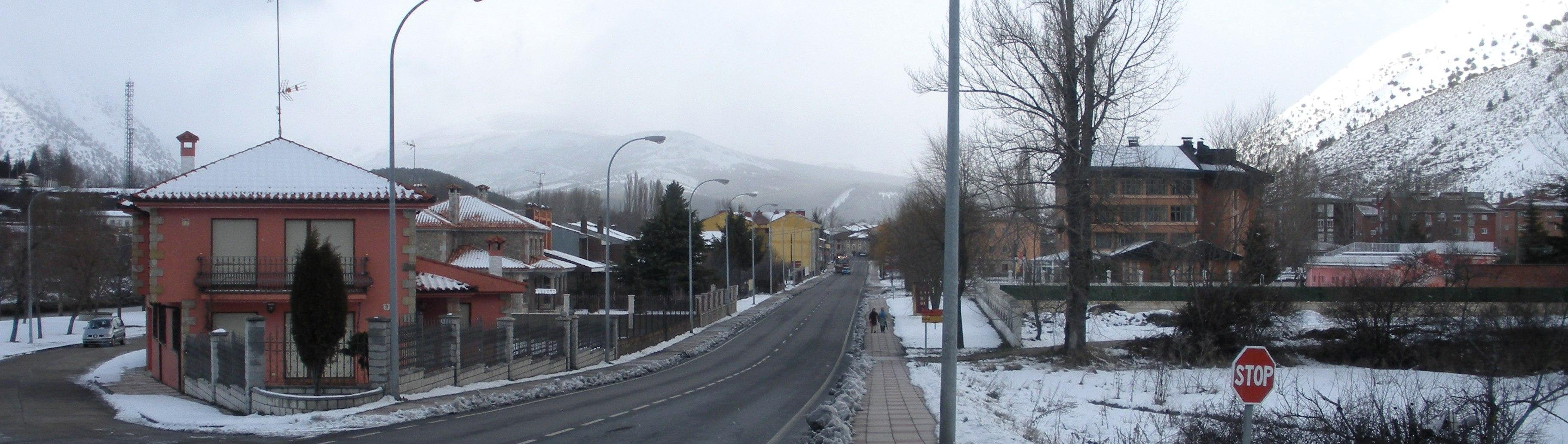 Panorámica de entrada en Velilla del Río Carrión (Palencia), España.